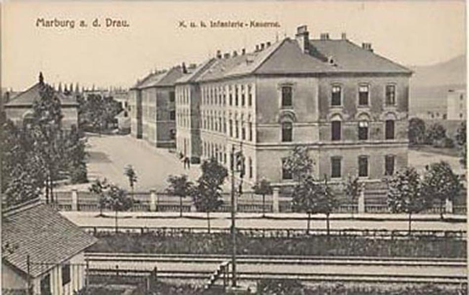 k.u.k. Infanteriekaserne in Marburg an der Drau